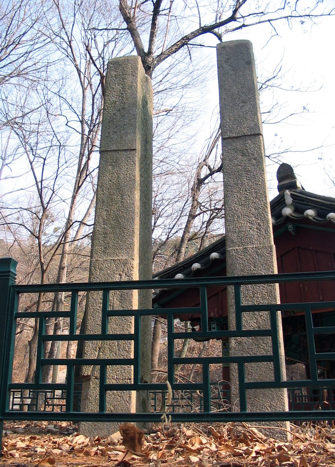 동화사당간지주.